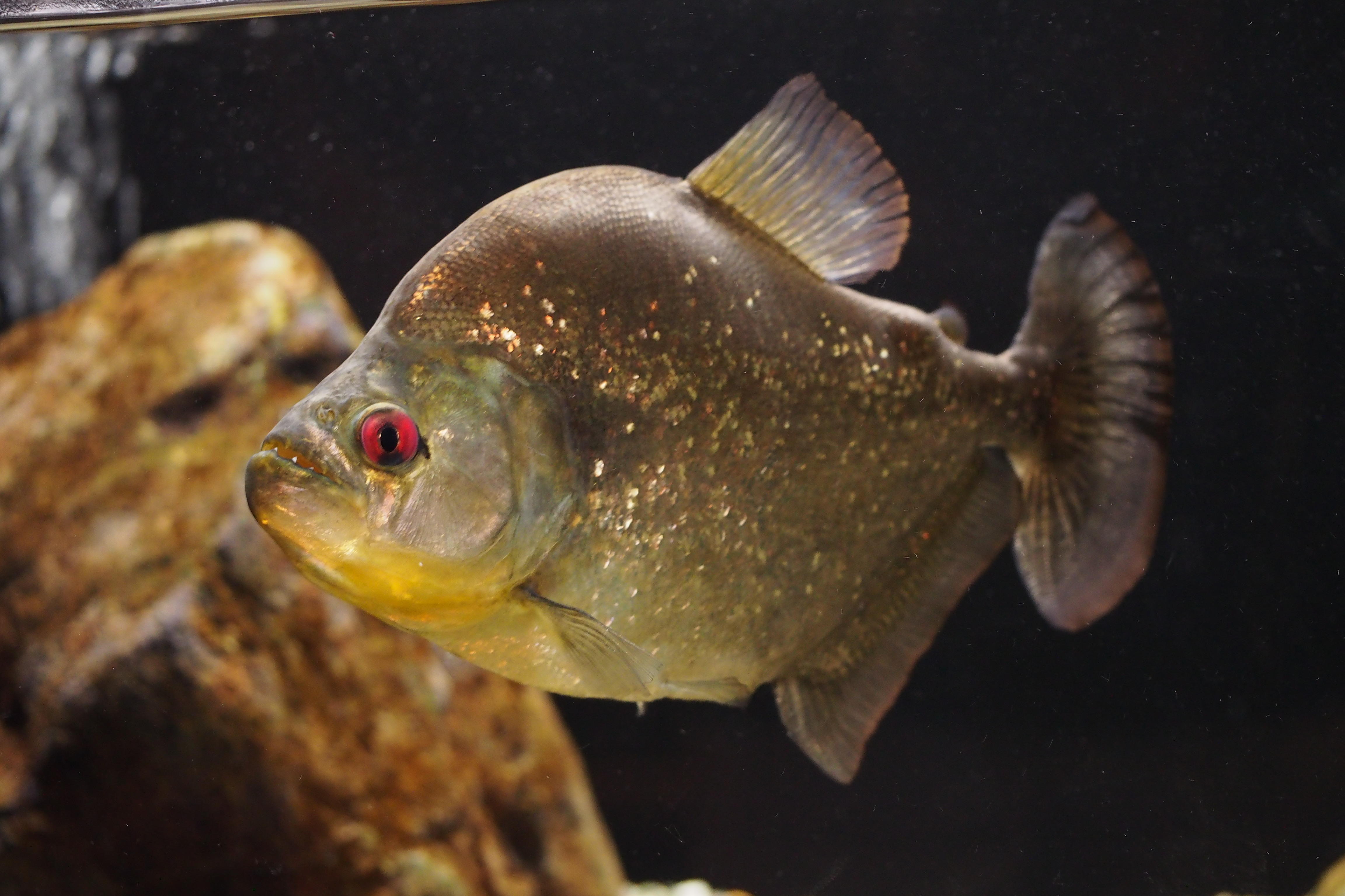 Serrasalmus spilopleura. at Suma aquarium.